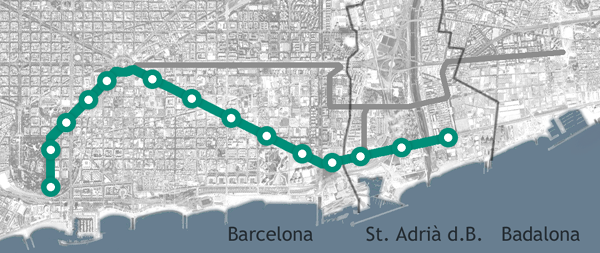 Plànol de la línia T4 del Trambesòs